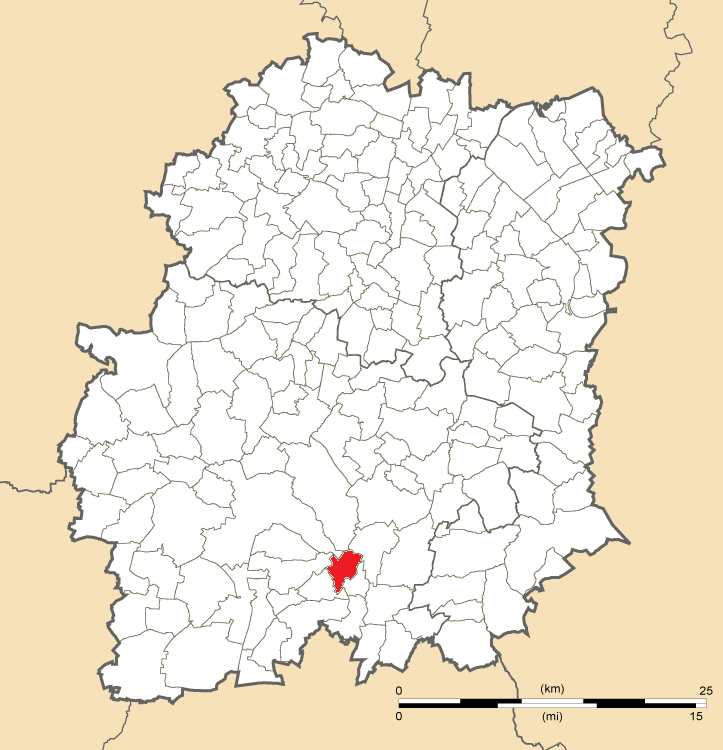 Carte de position de La Forêt-Sainte-Croix en Essonne (91)